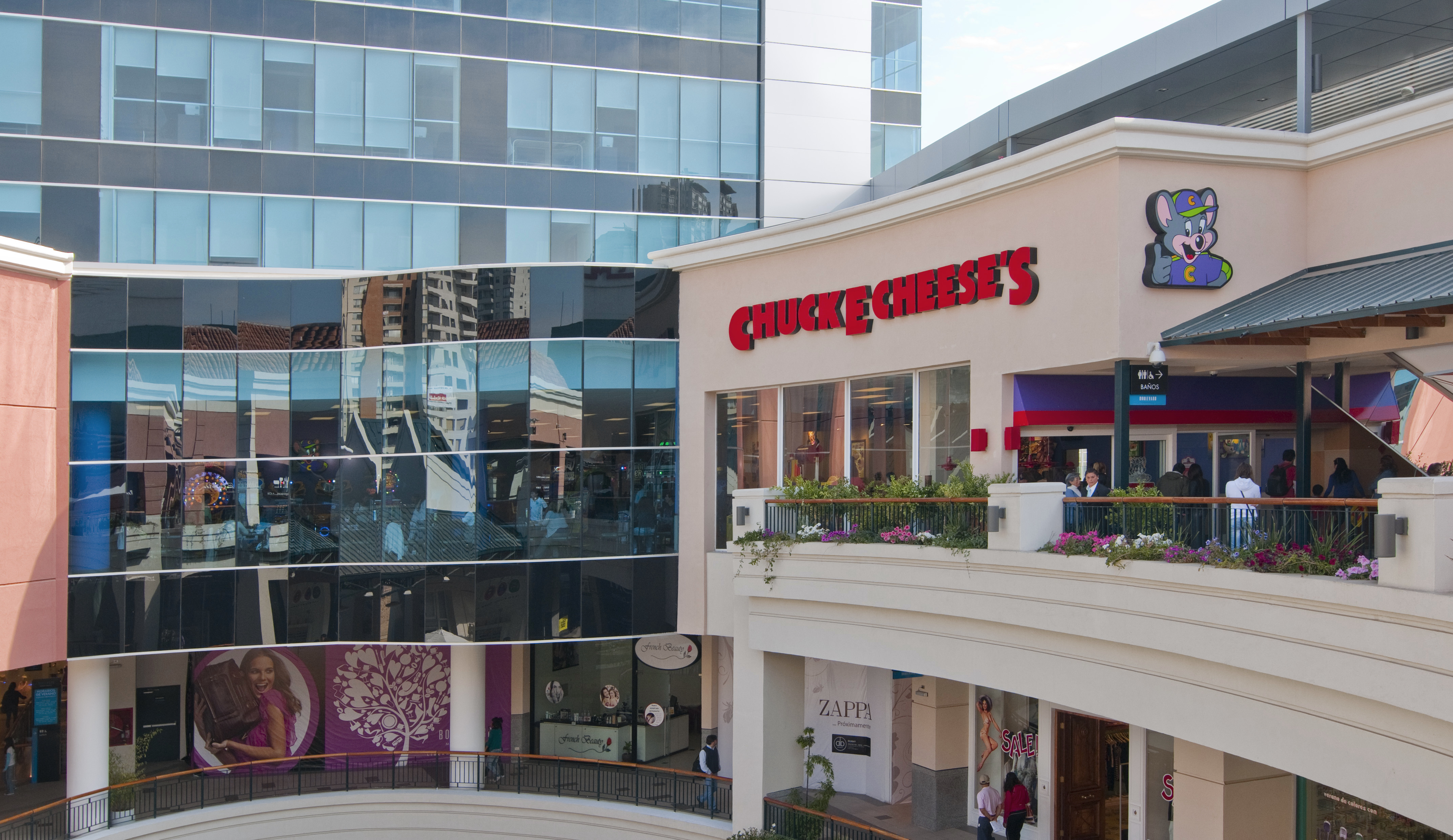 Local Chuck E. Cheese´s en Mall Boulevard Marina Arauco, Viña del Mar, Chile